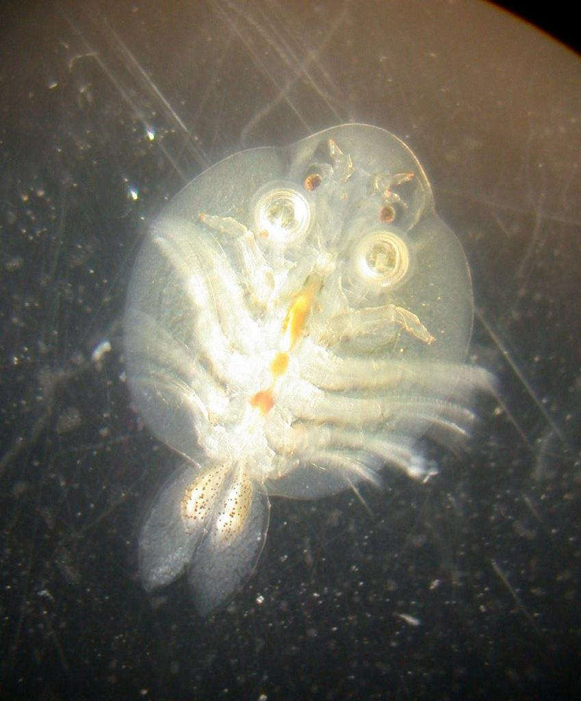 Argulus coregoni ：チョウモドキ 2004/11/20 和歌山県田辺市：Tanabe City. Wakayama Pref. Japan